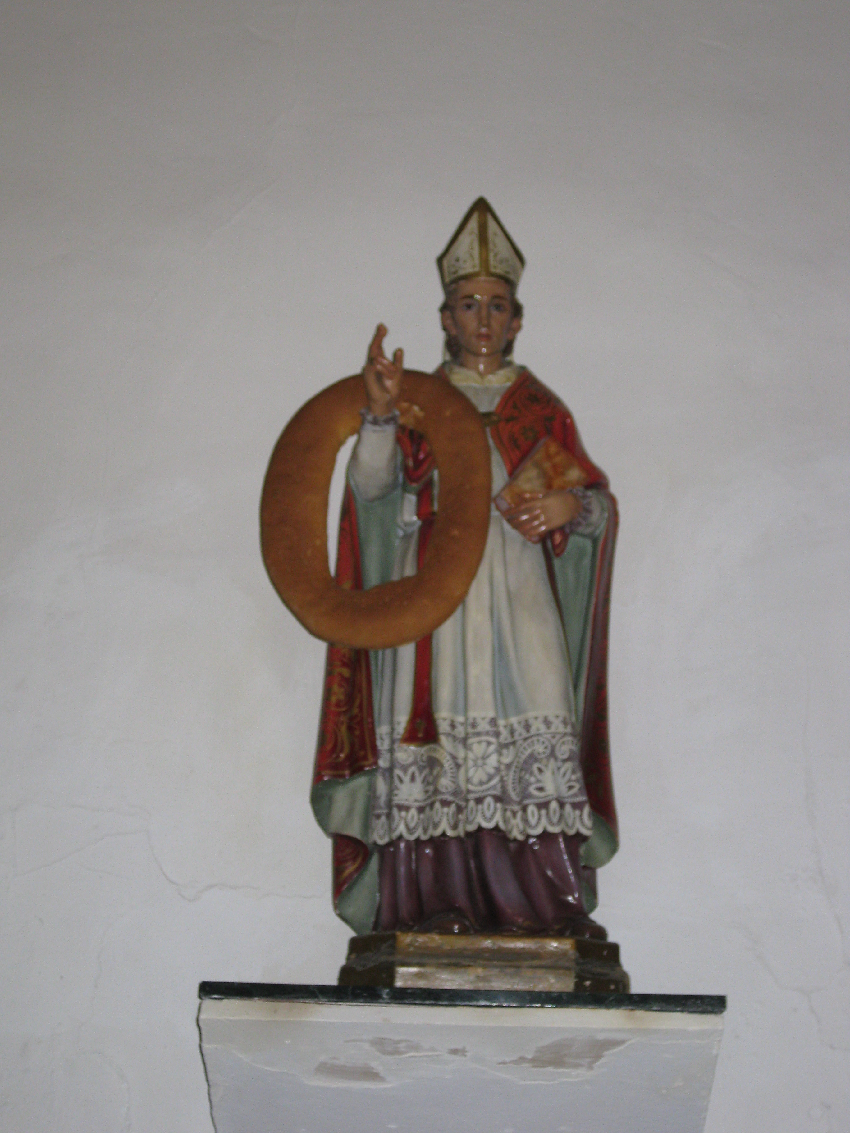 La imagen muestra la estatua de San Blas, santo que está ubicado en la Iglesia de Nuestra Señora de la Anunciación en El Bejarín.